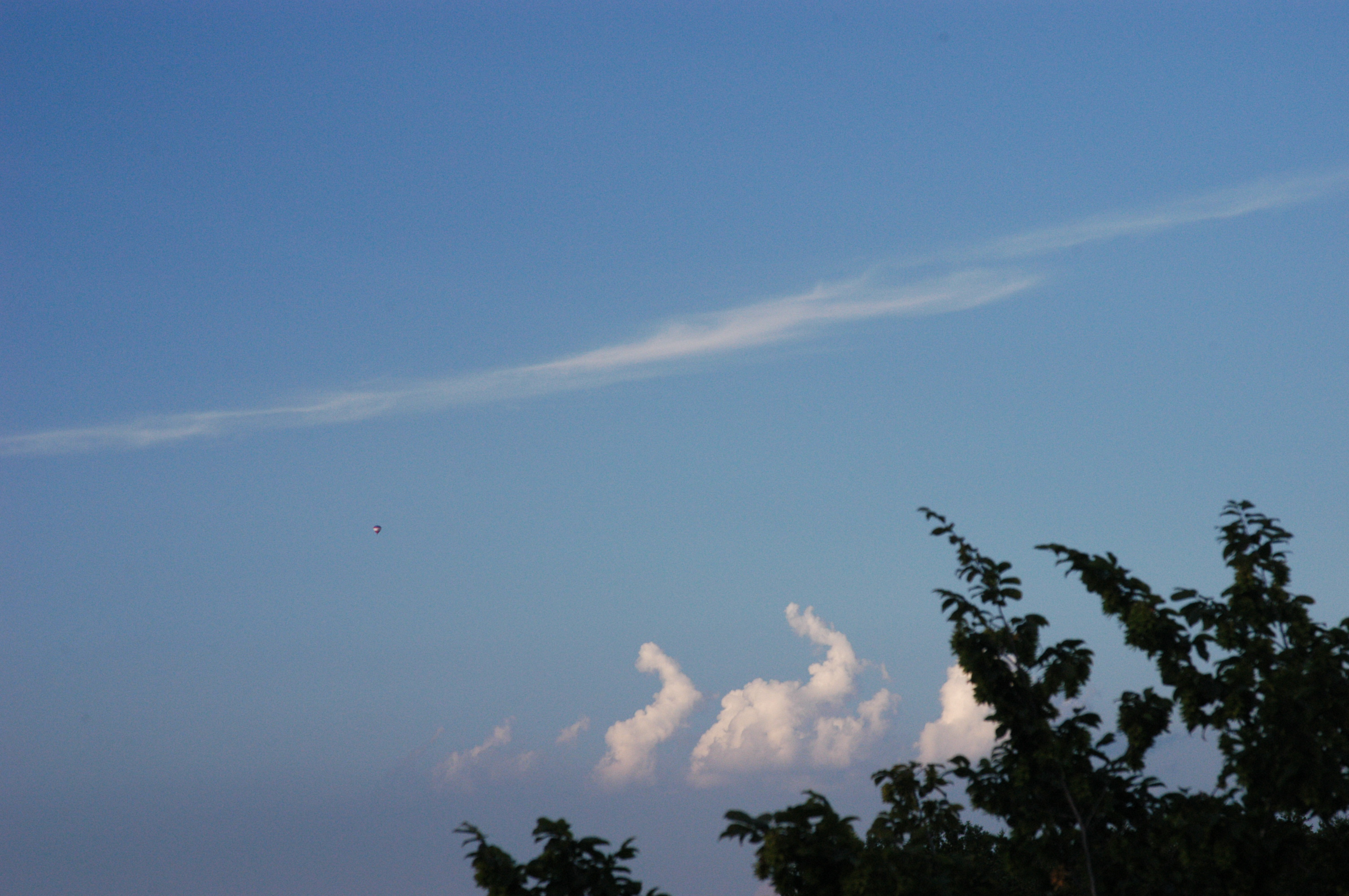 (en) Stratocumulus castellanus (de) Stratocumulus castellanus Place/Ort: Uzwil, SG, CH, in Richtung Norden